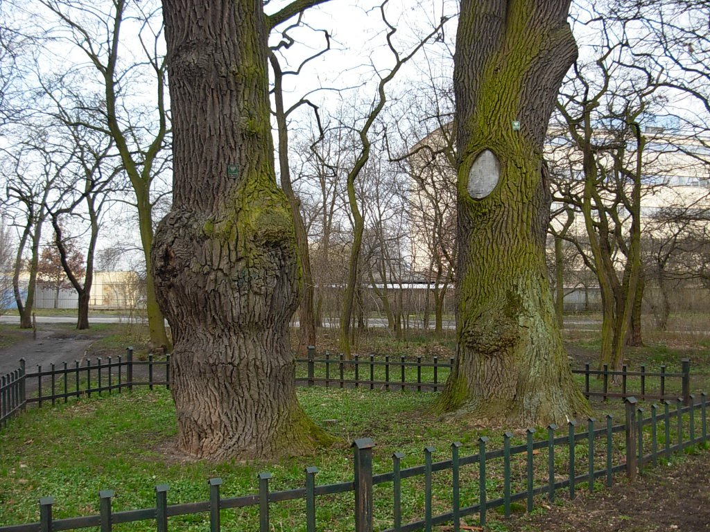 Dęby pomniki przyrody w otoczeniu kartodromu w Bydgoszczy